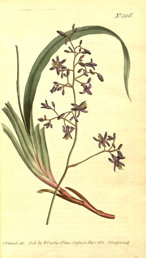 Illustration of Dianella caerulea